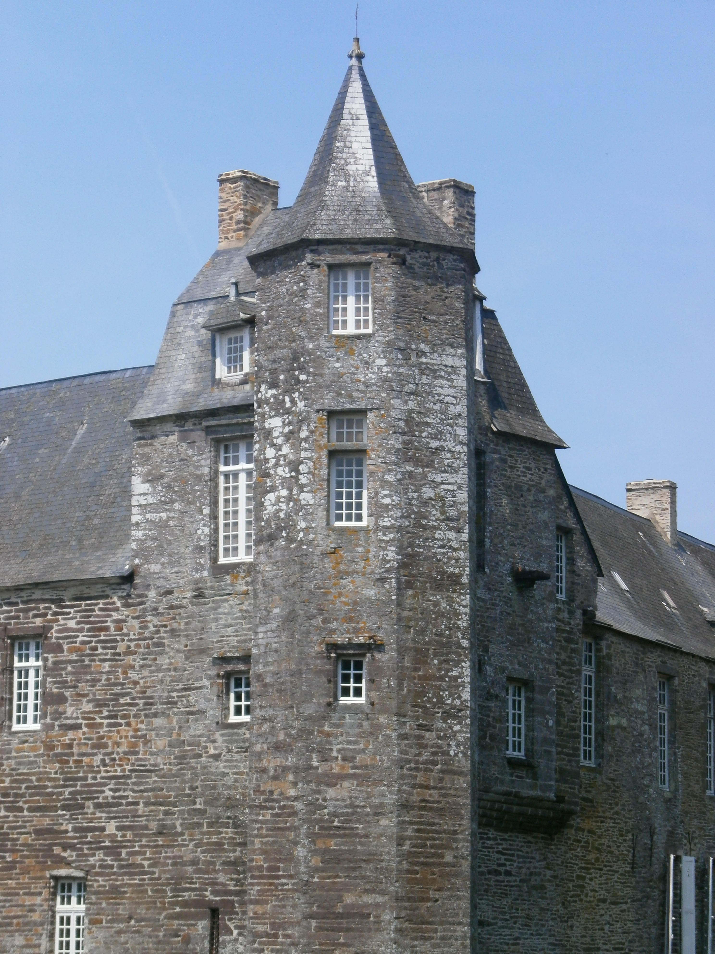 Château de Trécesson, Campénéac, Porhoët